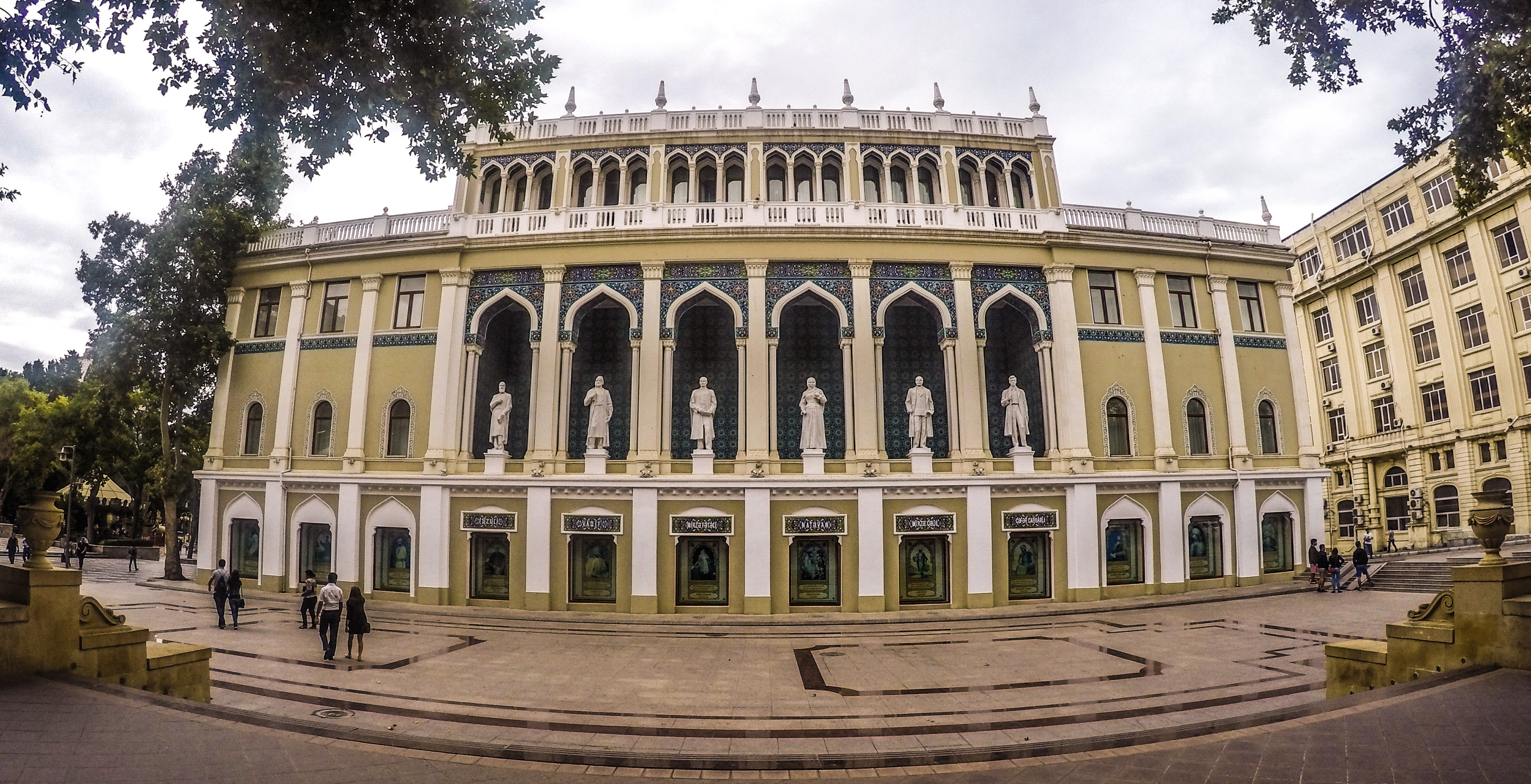 Nizami Gəncəvi adına Azərbaycan Ədəbiyyat Muzeyi 2015